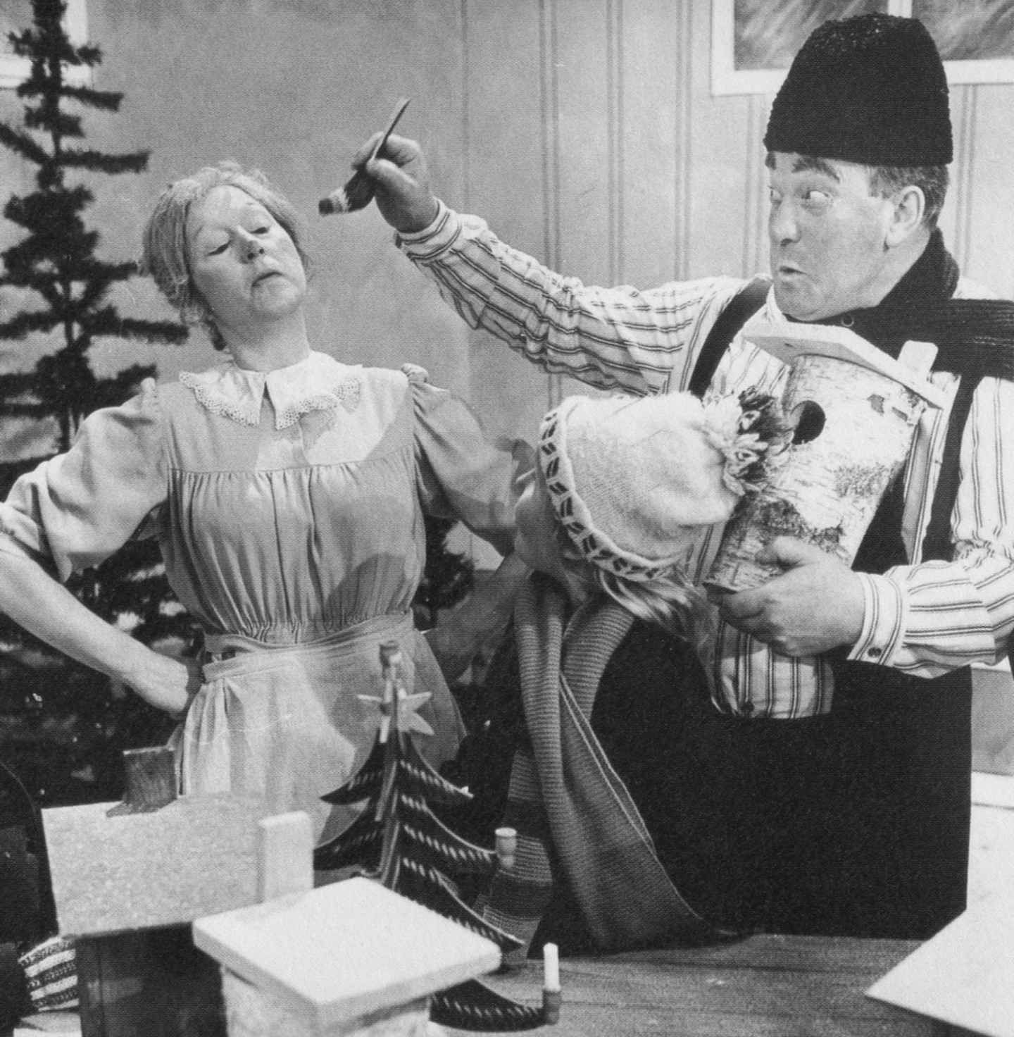 Birgitta Andersson och Carl-Gustaf Lindstedt i Sveriges Radio-TV:s adventskalender "Teskedsgumman"